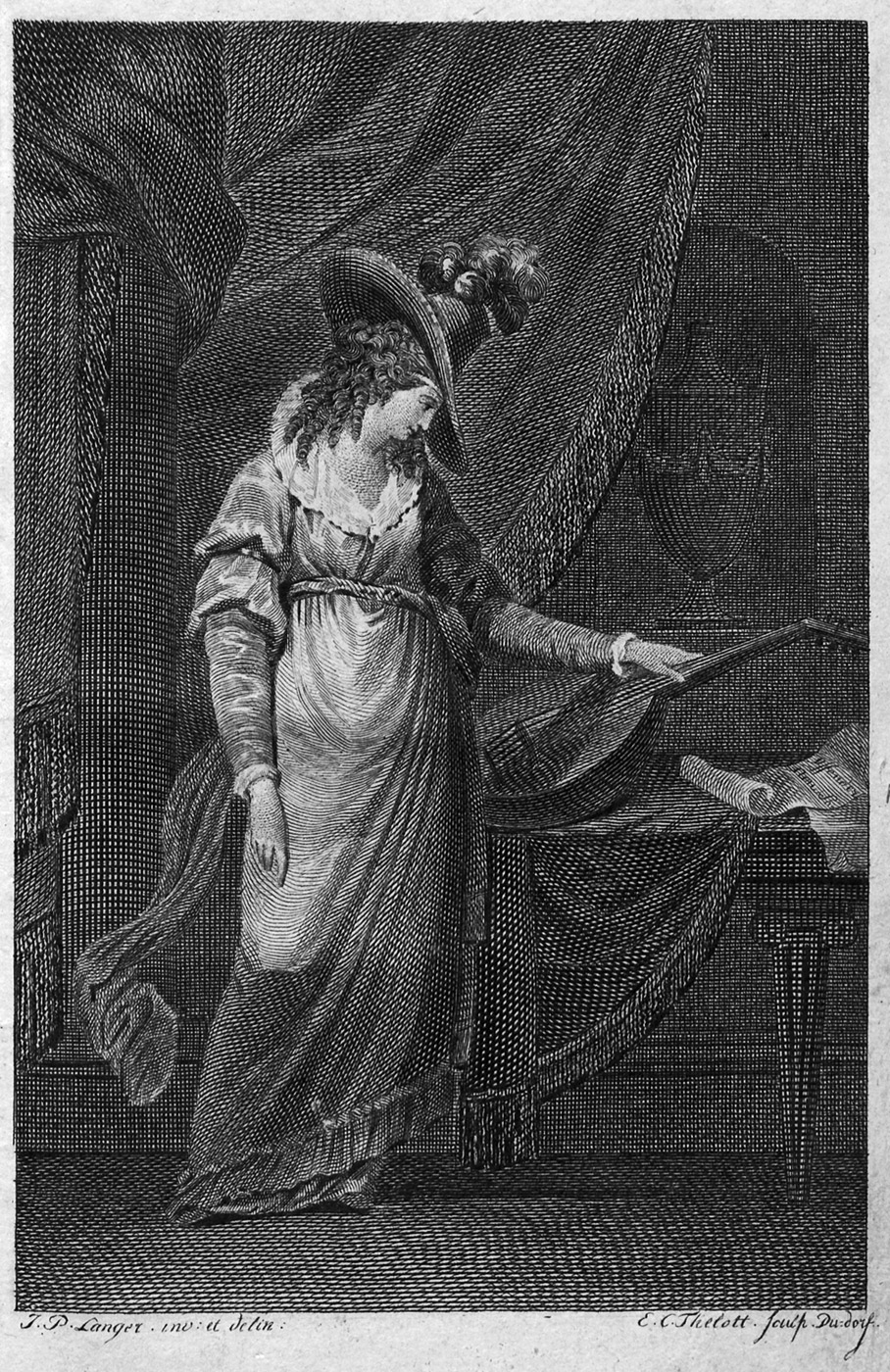 Illustration zu: Sophie von La Roche: Geschichte von Miß Lony und der schöne Bund. Gotha, Ettinger, 1789.